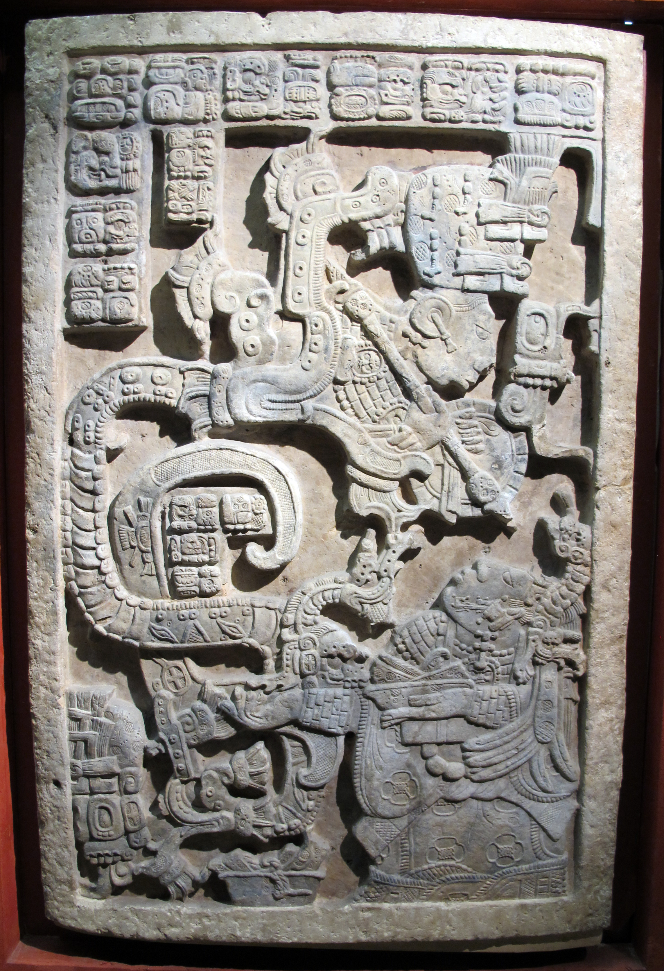 Maya, lintel 25, da yaxchilan, 725